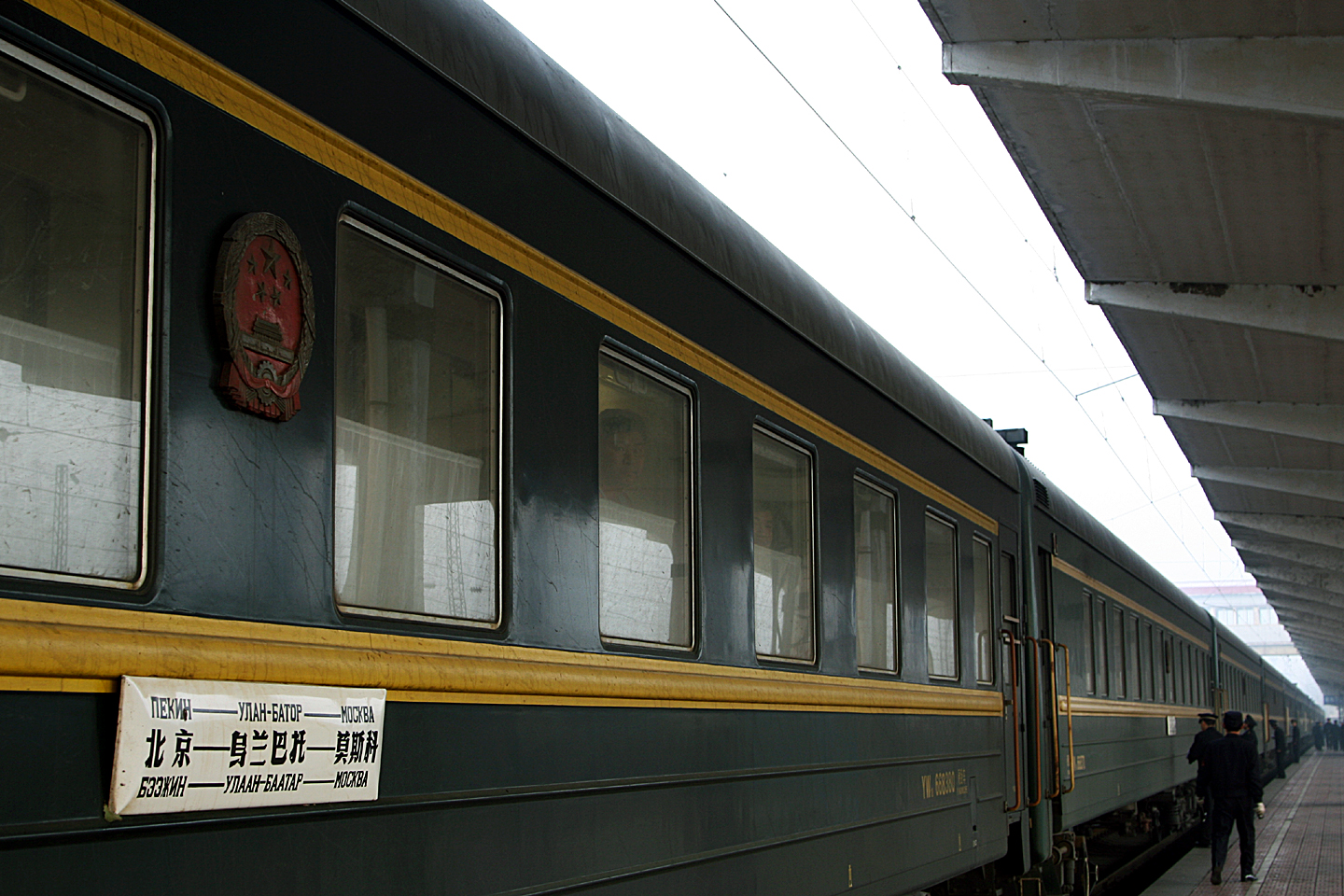 停靠在大同站的K4次列车。